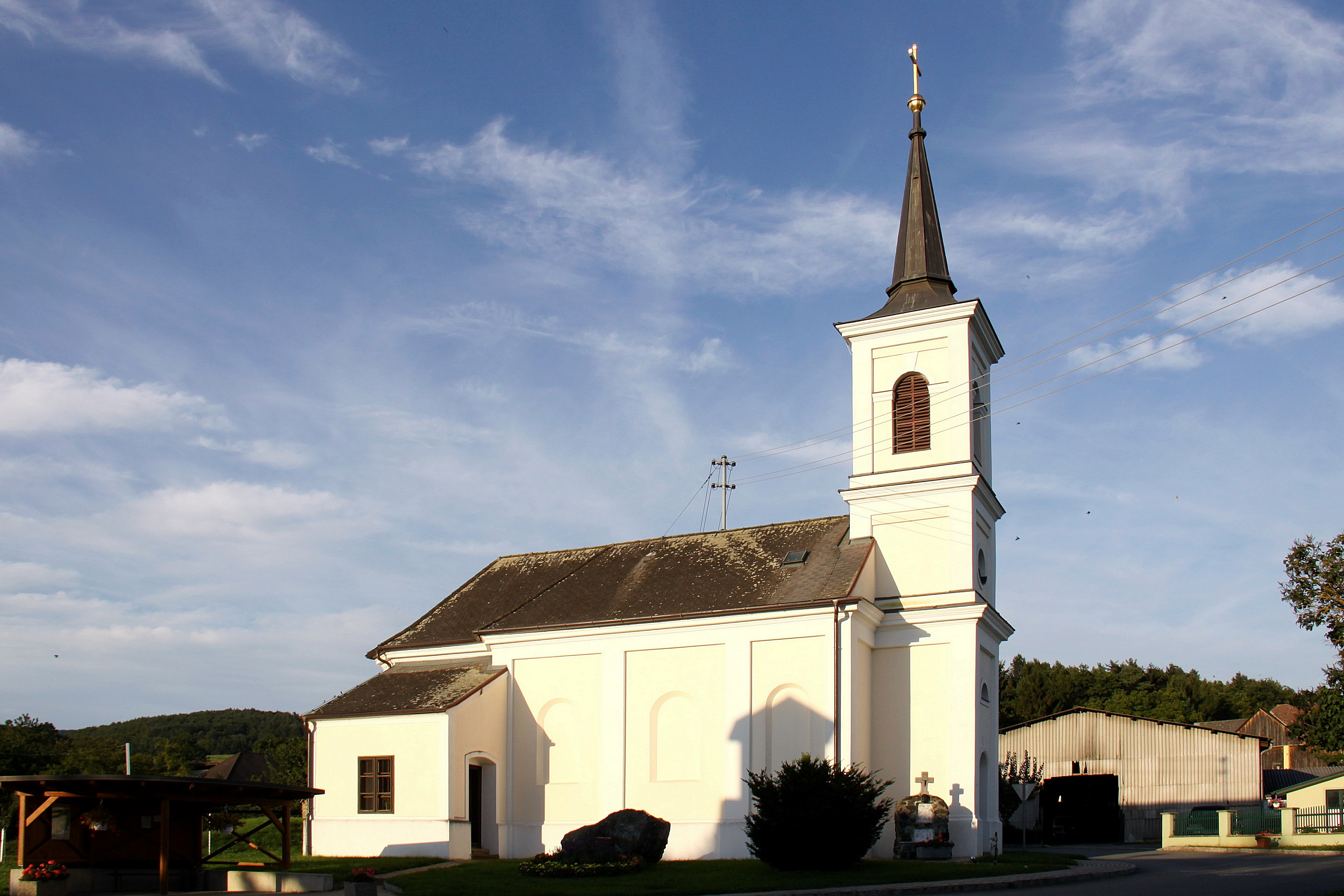 Weiden bei Rechnitz - Filialkirche hll. Petrus und Paulus in Rumpersdorf Object location47° 18′ 54.94″ N, 16° 19′ 36.99″ E